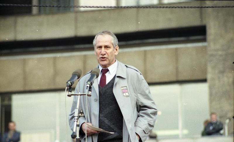 ADN-ZB/Grimm/4.11.89/Berlin: Demonstration/ 500.000 Bürger beteiligen sich an einer Demonstration für den Inhalt der Artikel 27 und 28 der Verfassung der DDR. Auf dem anschließenden Meeting auf dem Alexanderplatz ergriff auch der Schriftsteller Markus Wolf das Wort.